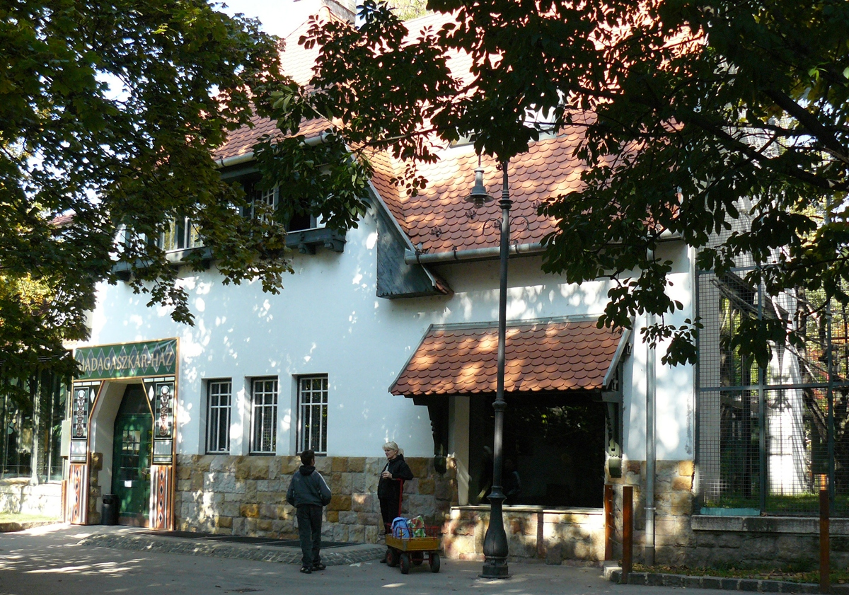 A 2010-ben átadott Madagaszkár-ház külső képe a Fővárosi Állatkertben (Budapest)